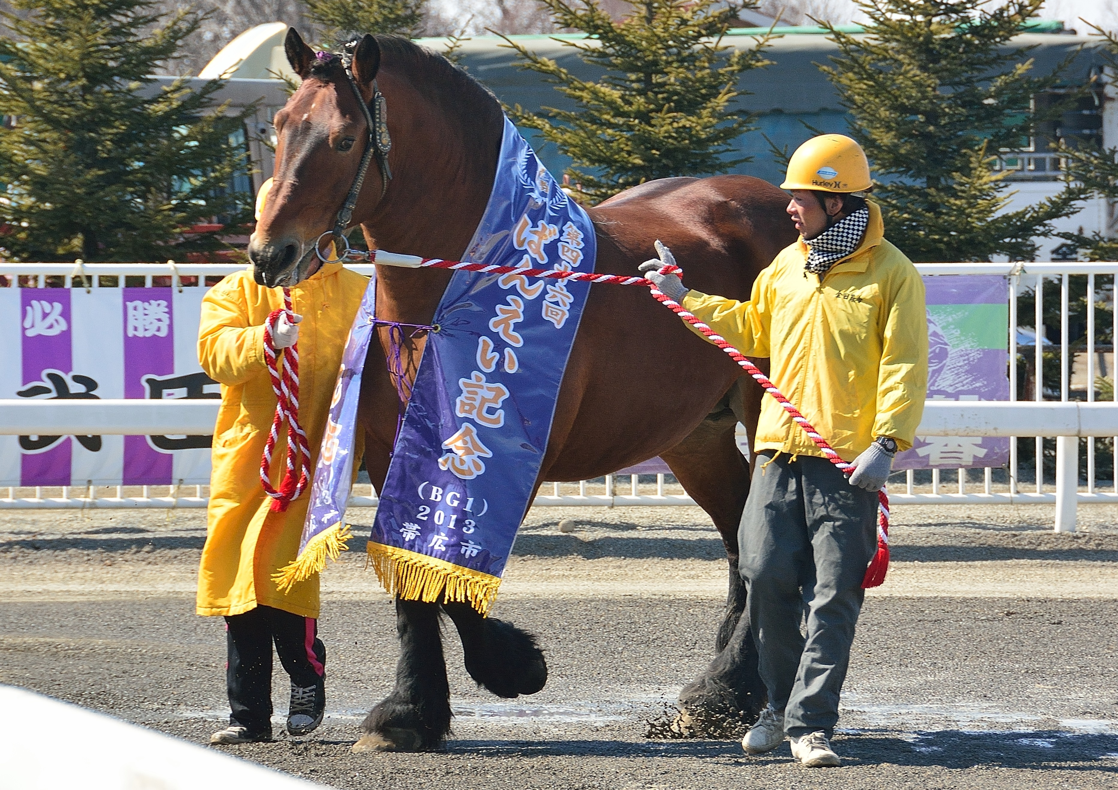 帯広競馬場で引退式に臨むインフィニティー（2016年3月21日）